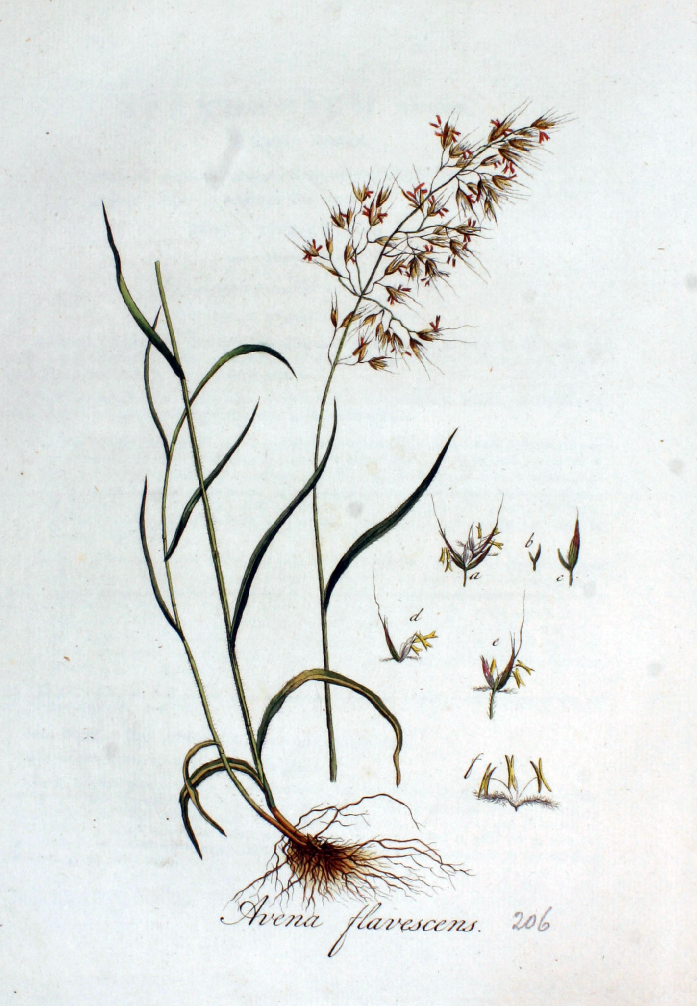 Trisetum flavescens (L.) P. Beauv. (Syn. Avena flavescens L.)